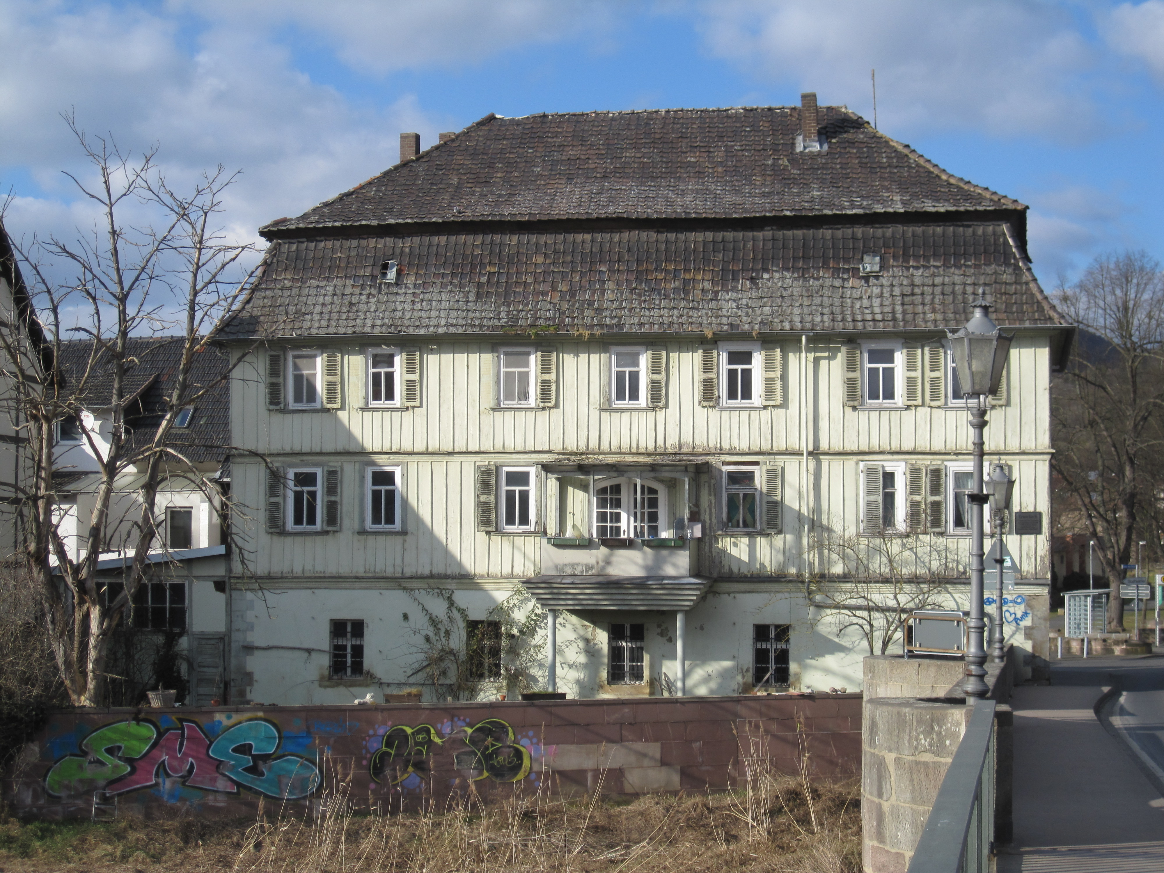 Witzenhausen: Barockes Haus nördlich der Werra-Brücke, in dem der Schriftsteller Ernst Koch Kindheitsjahre verbrachte. Daran erinnert eine Plakette an der Südseite des Gebäudes.